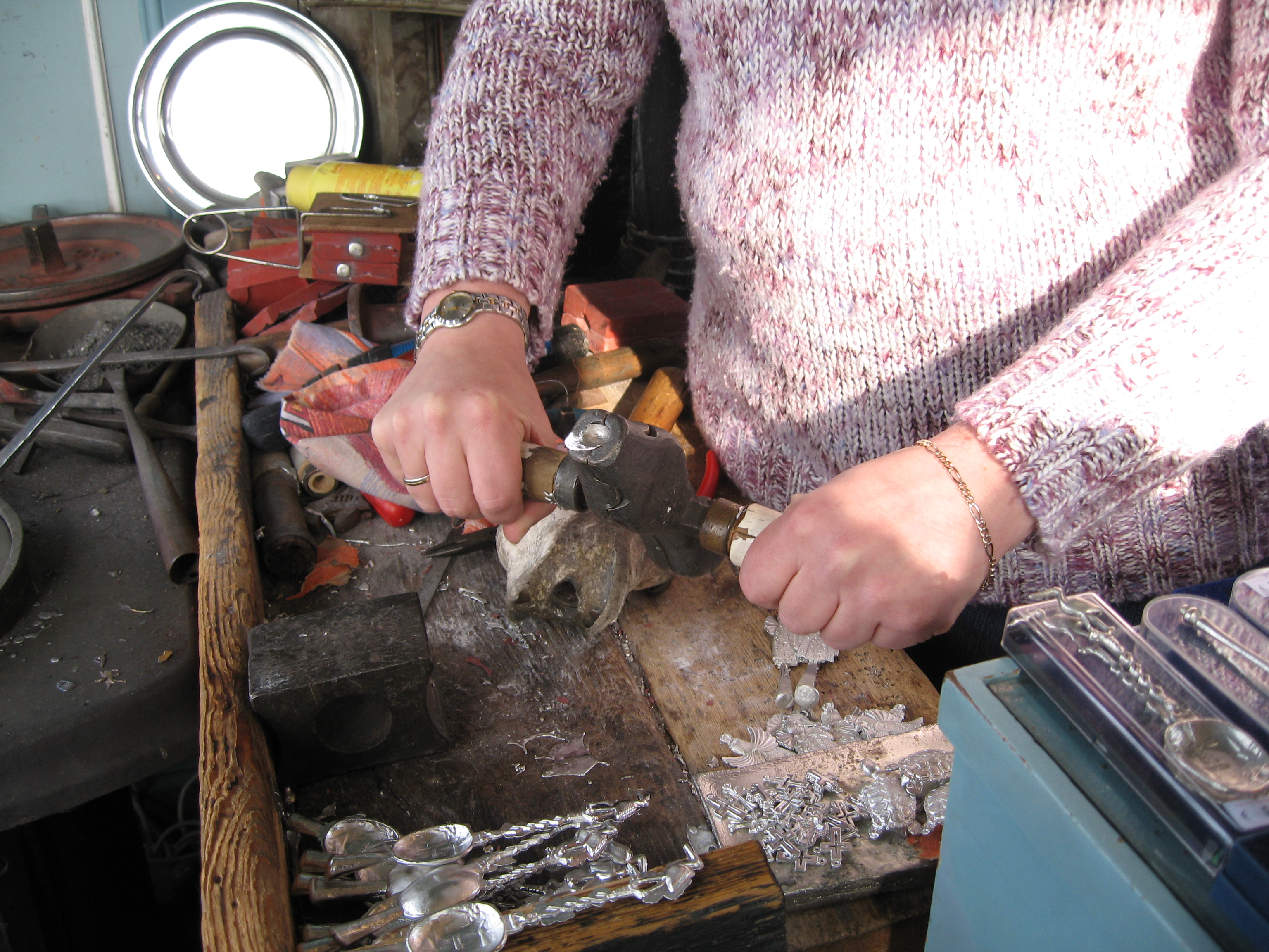 Tingieten. Wachten totdat de vloeibare tin is gestold in de bronzen mal. Foto gemaakt door Ellywa op 23 februari 2007 in de Tinkoepel aan de Zaanse Schans, Zaandam. Met dank aan mw. I.J. Blaauboer, Waiting for the tin to cool down Picture by Ellywa on February 23, 2007, in the Tinkoepel in Zaandam, The Netherlands. With thanks to mrs. I.J. Blaauboer